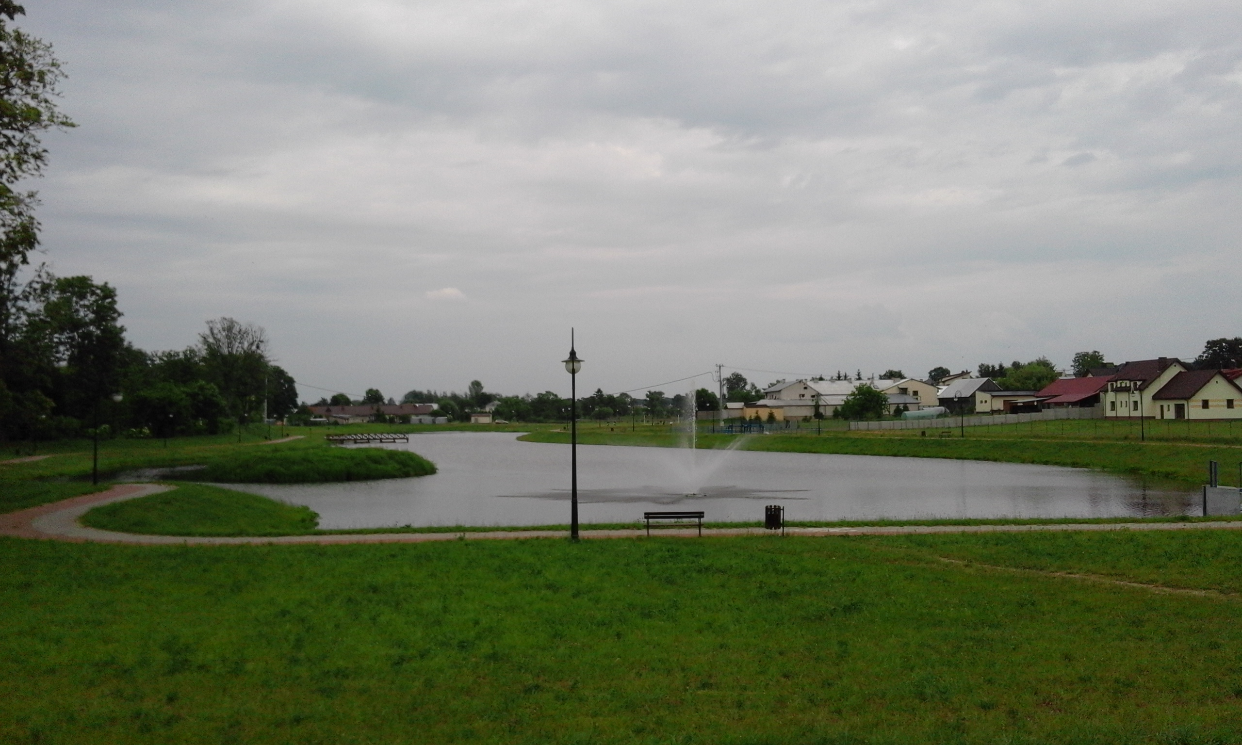 24 maja 2014 roku został otwarty zalew w Czyżewie.